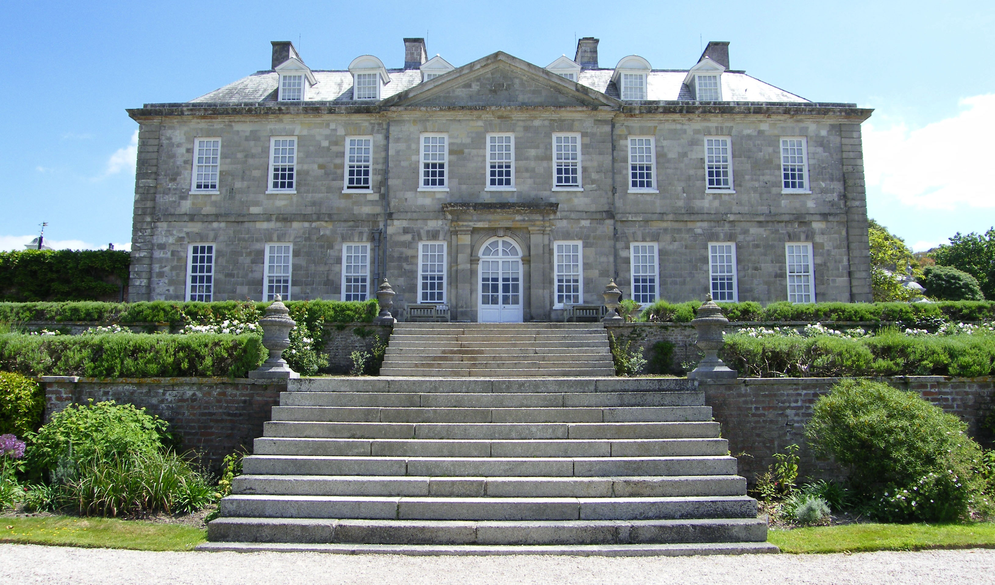 Mansion